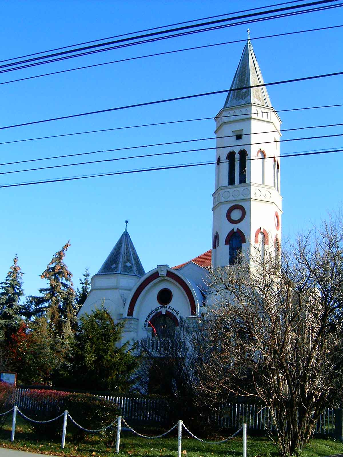 Budafoki Református Templom. Épült 1927-ben Van-Beck János tervei szerint